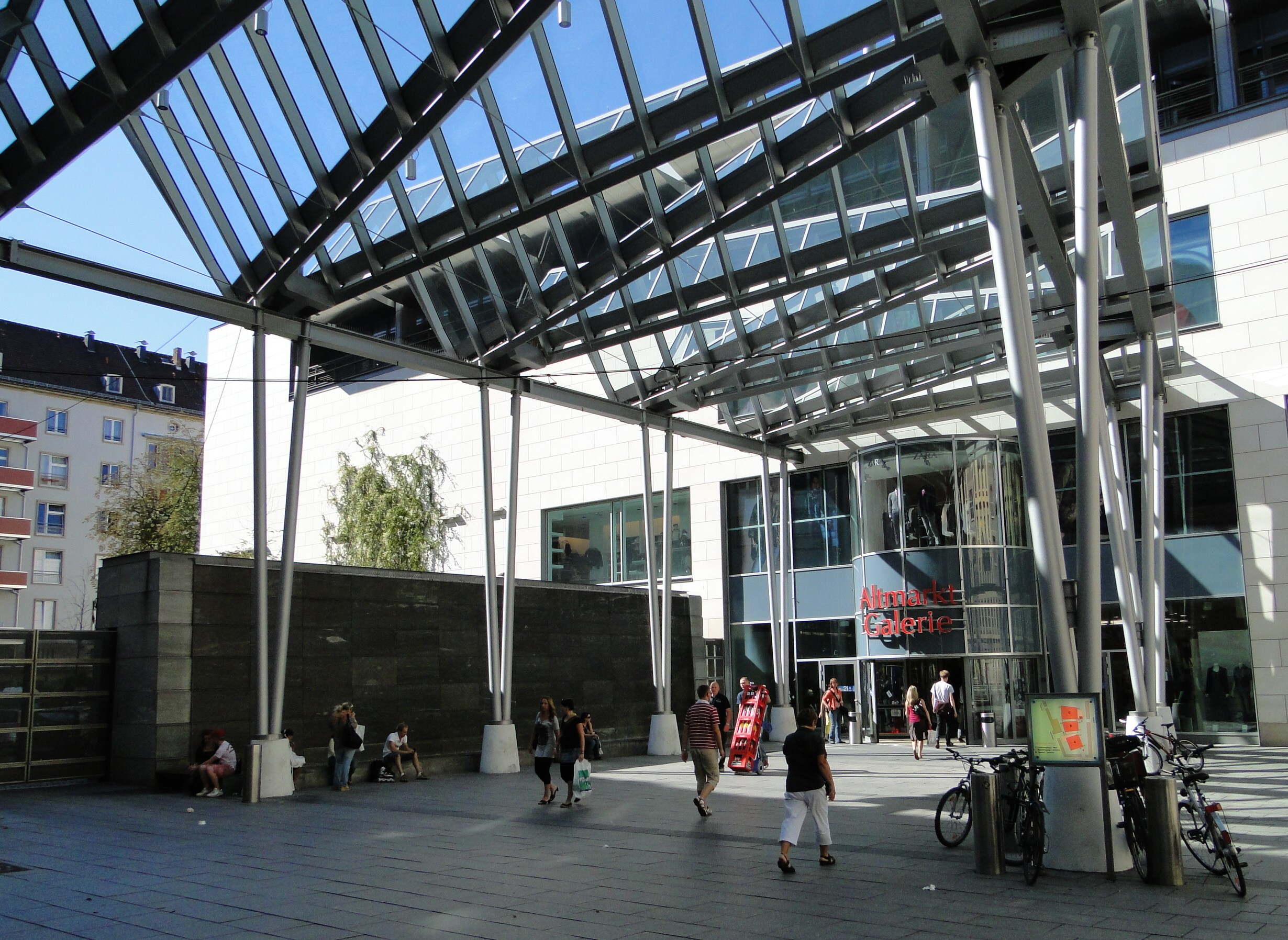 Wasserwand am Eingang der Altmarkt-Galerie am Postplatz Dresden